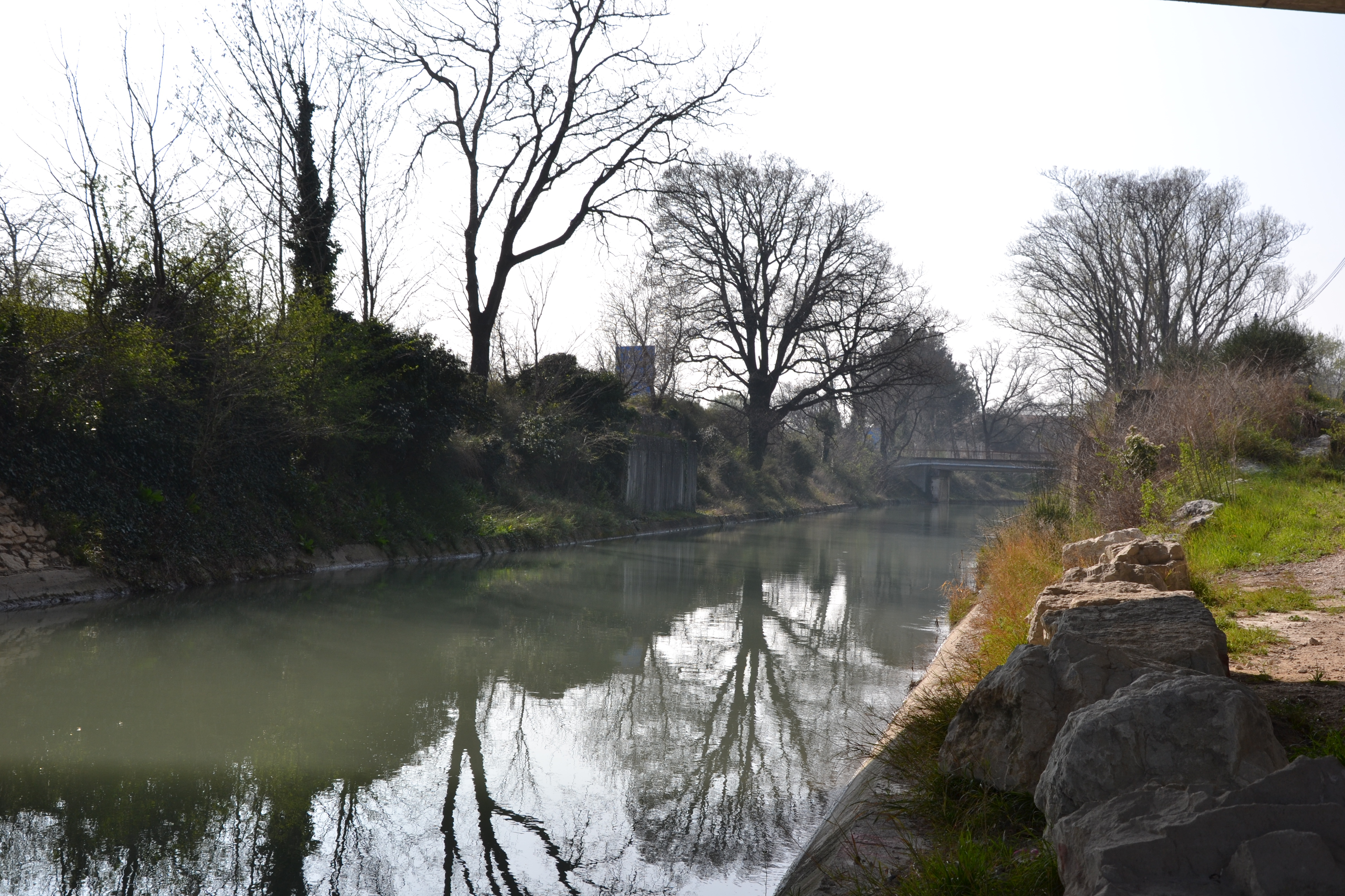 Durancole près de Bonpas